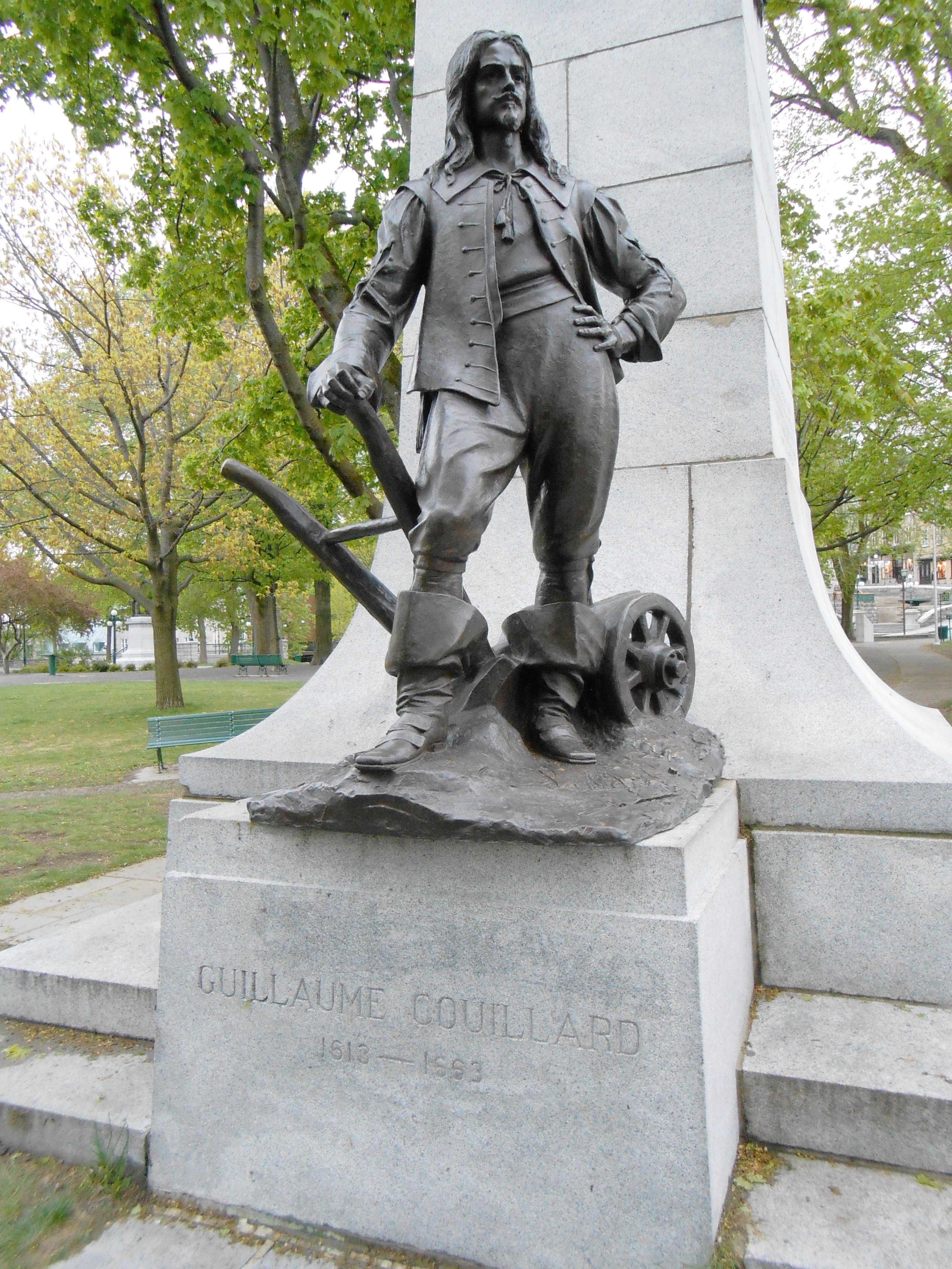 « Le monument Louis-Hébert (1575-1627) avait été initialement installé à la place de l'Hôtel de Ville, où il fut dévoilé le 3 septembre 1918, pour commémorer le troisième centenaire de l'arrivée en 1617 de cet apothicaire français qui est devenu le "premier colon canadien". Le monument fut démonté en 1971 et ultérieurement déménagé dans le parc Montmorency, au sommet de la côte de la Montagne. Les terres de Louis Hébert s'étendaient sur le site actuel de la Basilique Notre-Dame de Québec, du Séminaire, de l'Hôtel-Dieu, et des rues Hébert et Couillard. La statue en bronze de Louis Hébert au sommet du monument, et les personnages des hauts-reliefs en bronze reposant les socles, sont l'œuvre du sculpteur montréalais Alfred Laliberté. L'artiste a représenté Louis Hébert élevant une poignée d'épis de blé vers le ciel, offrant au Seigneur sa première récolte. Les personnages des hauts-reliefs sont : à droite, Marie Rollet, épouse Louis Hébert qui, assise au milieu de ses trois enfants, tient un livre et les instruit; à gauche, une statue du défricheur Guillaume Couillard, son gendre, appuyé sur une charrue. Le piédestal est orné de festons, d'écussons, et d'inscriptions incluant les noms des quarante-sept premiers colons de Québec. »